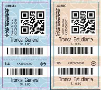 Boletos para cobro de tarifas del corredor azul.